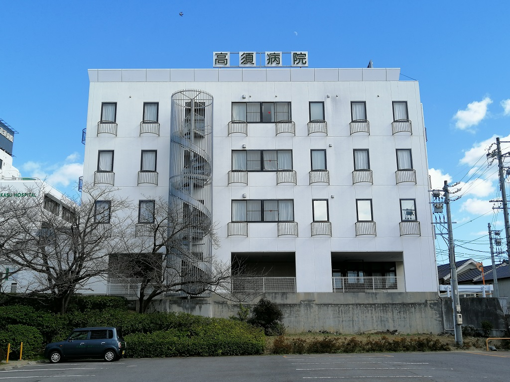 高須病院（西尾市一色町）